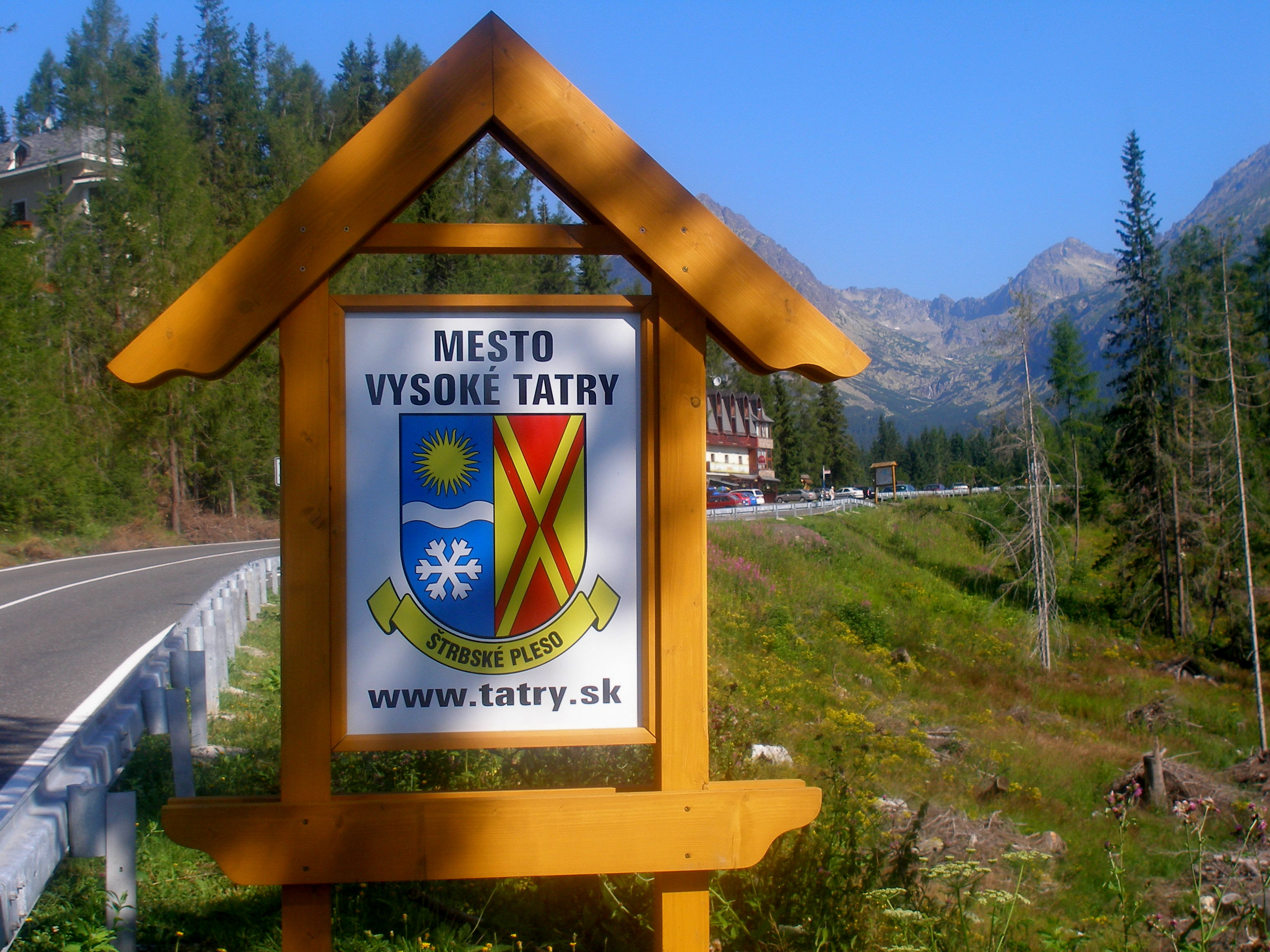 Tatranská osada Štrbské Pleso